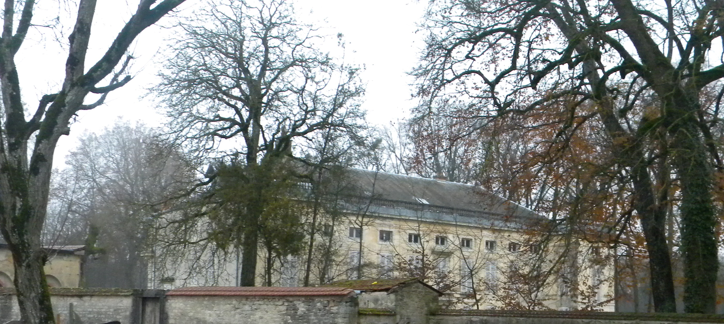 Kastelo de Bressey-sur-Tille